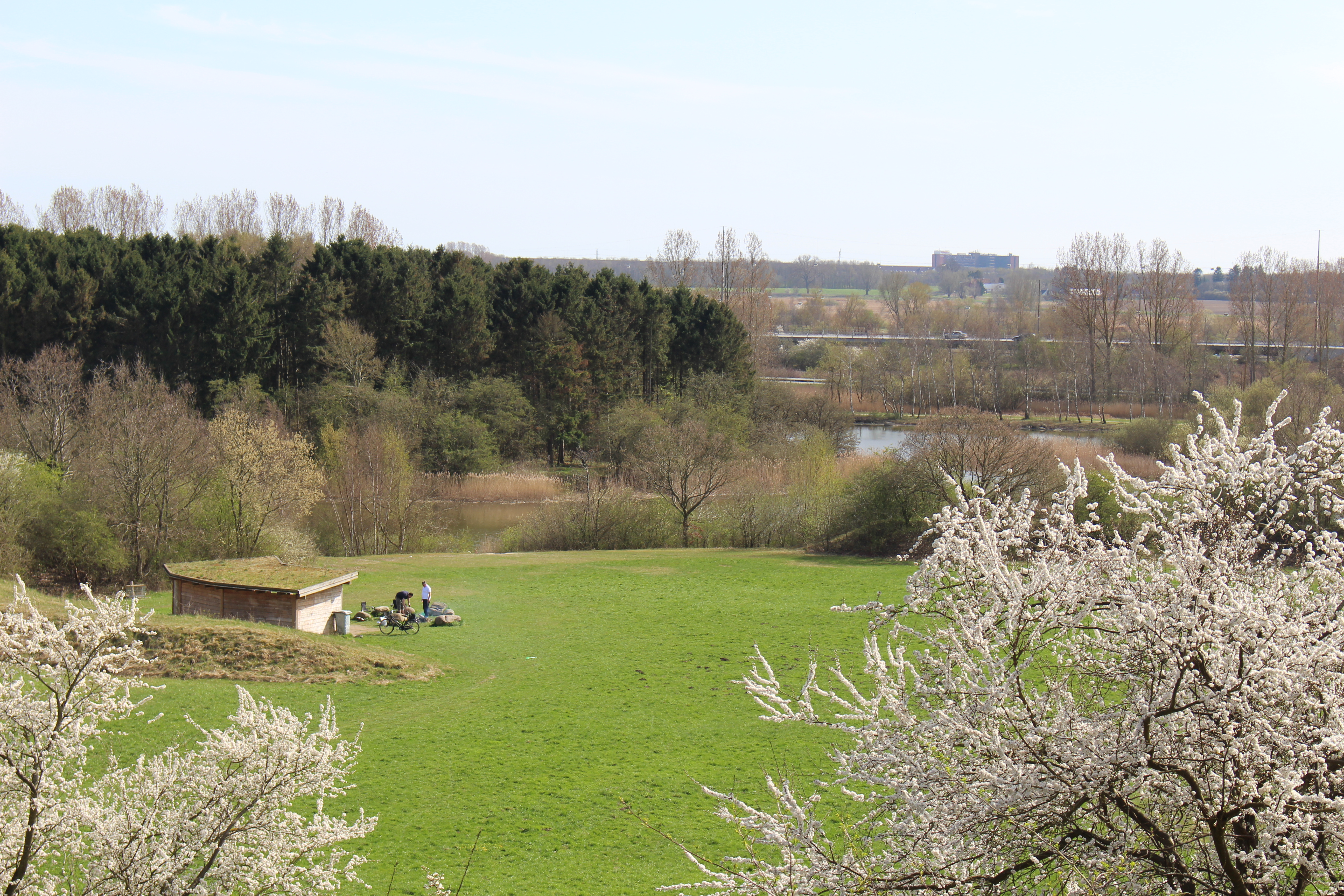 Høghsbjerget udsigt syd